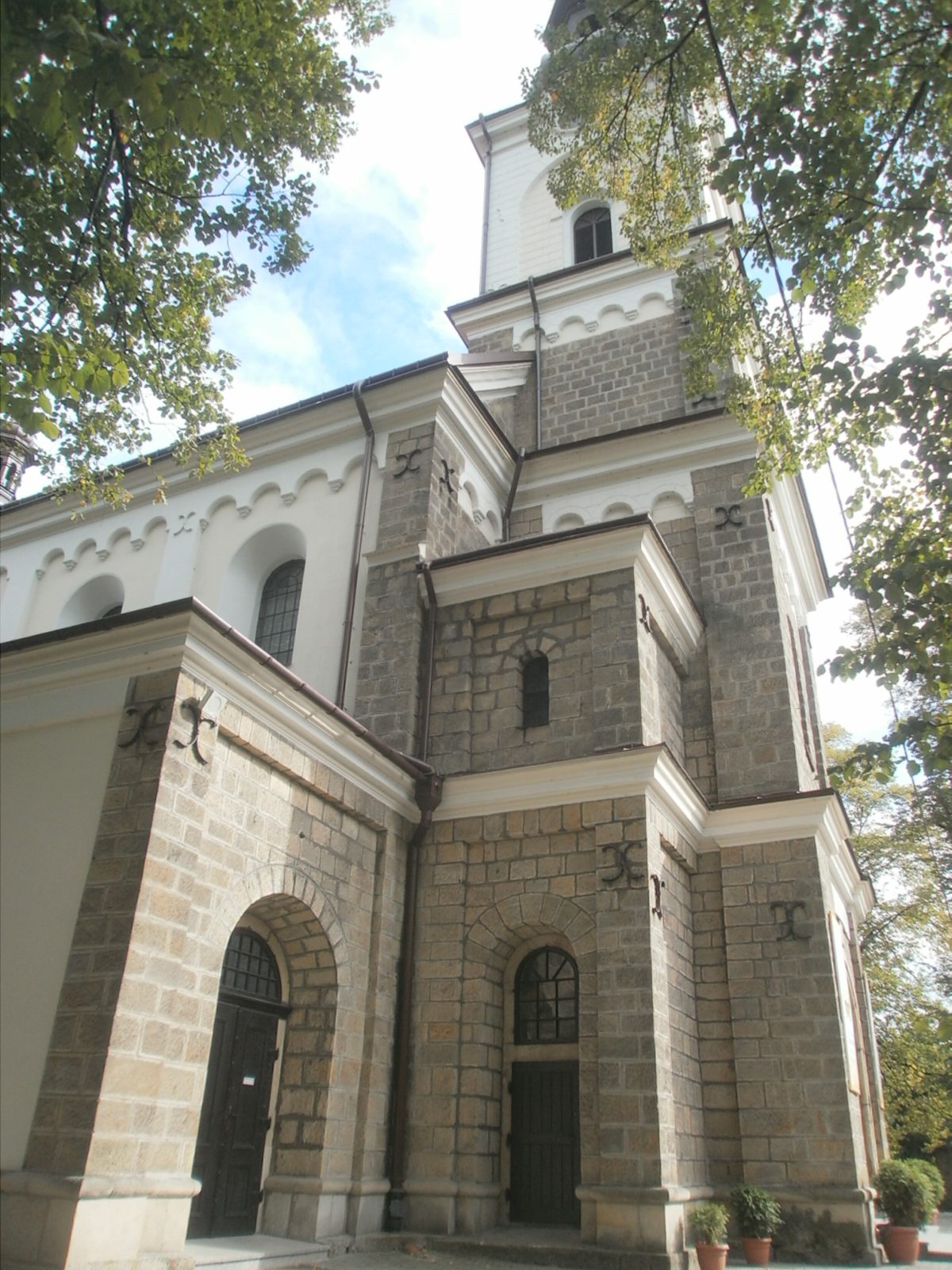 Żegocina - kościół parafialny p.w. św. Mikołaja Biskupa, 1895